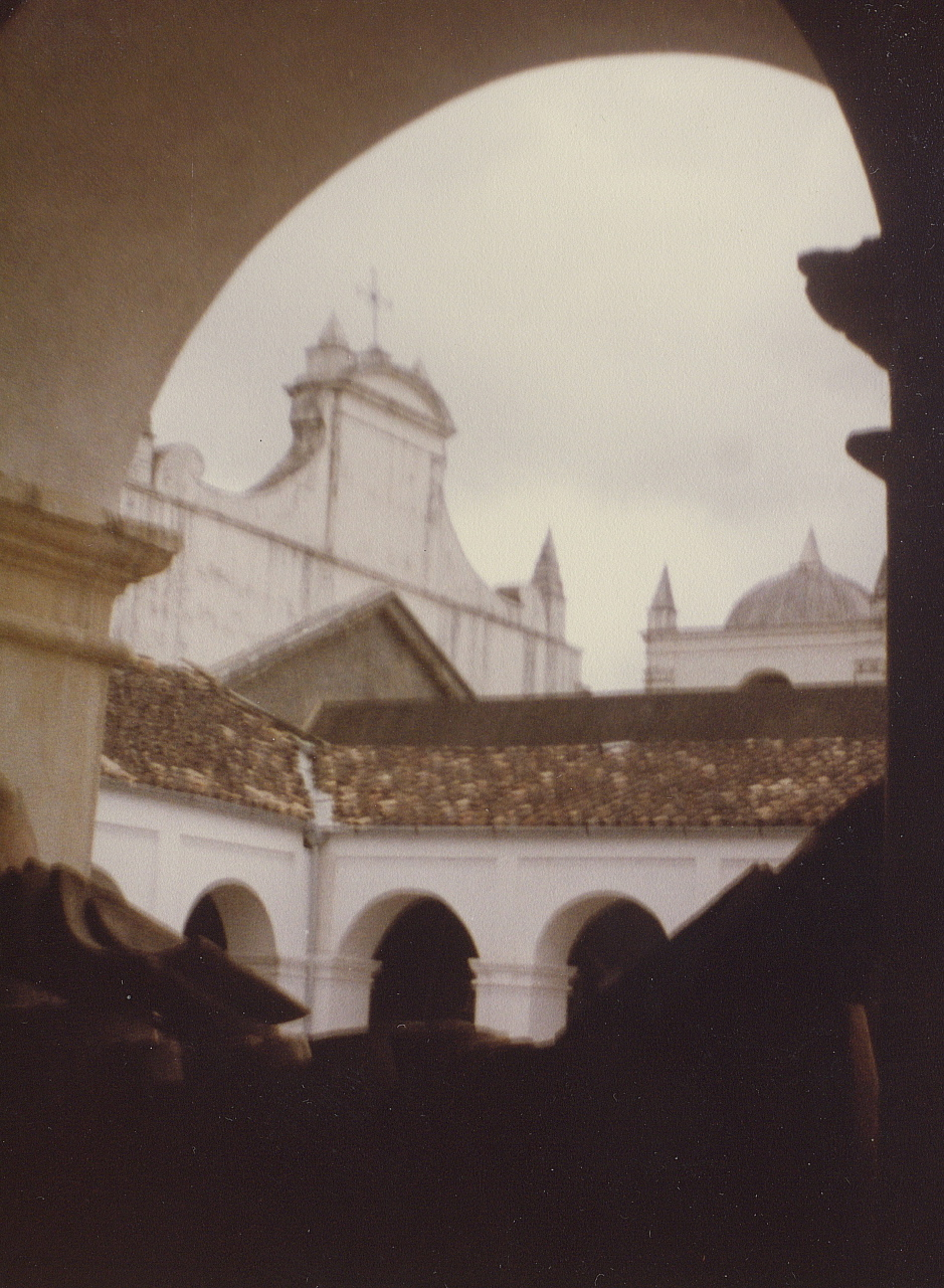 Coban, Guatemala.